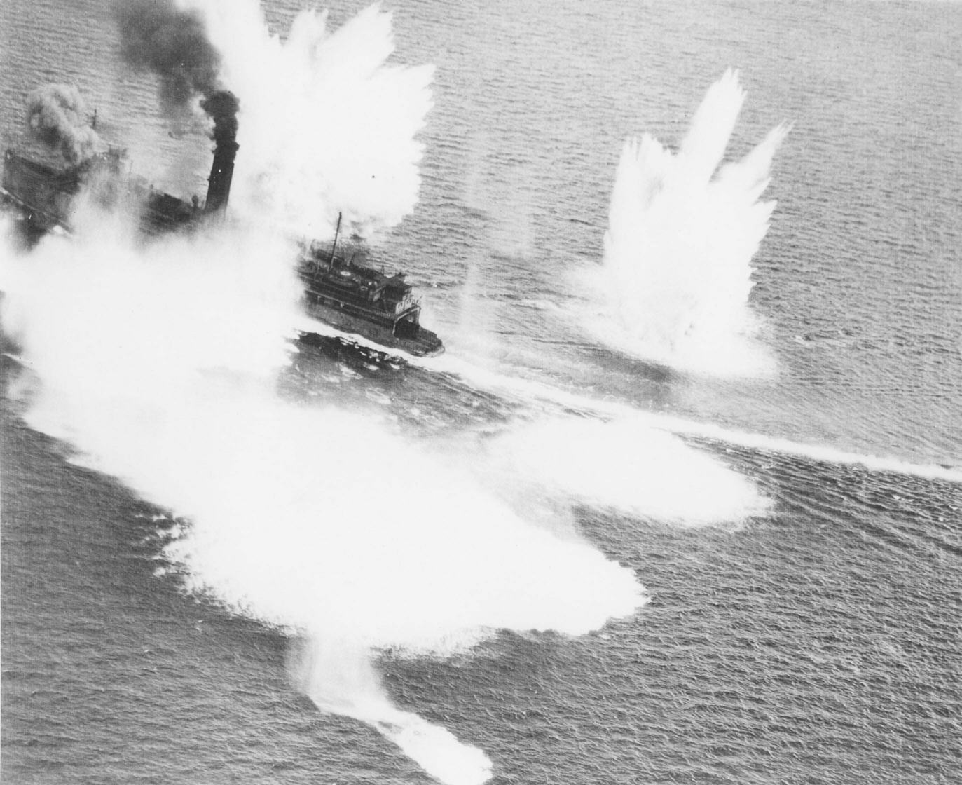 1945(昭和20)年7月15日青森発函館向け航行中、北海道狐越崎東方７Km付近において米空母エセックス(CV-9)およびランドルフ(CV-15)艦載機の攻撃をうける『津軽丸』（初代、鉄道省 3,484総トン）